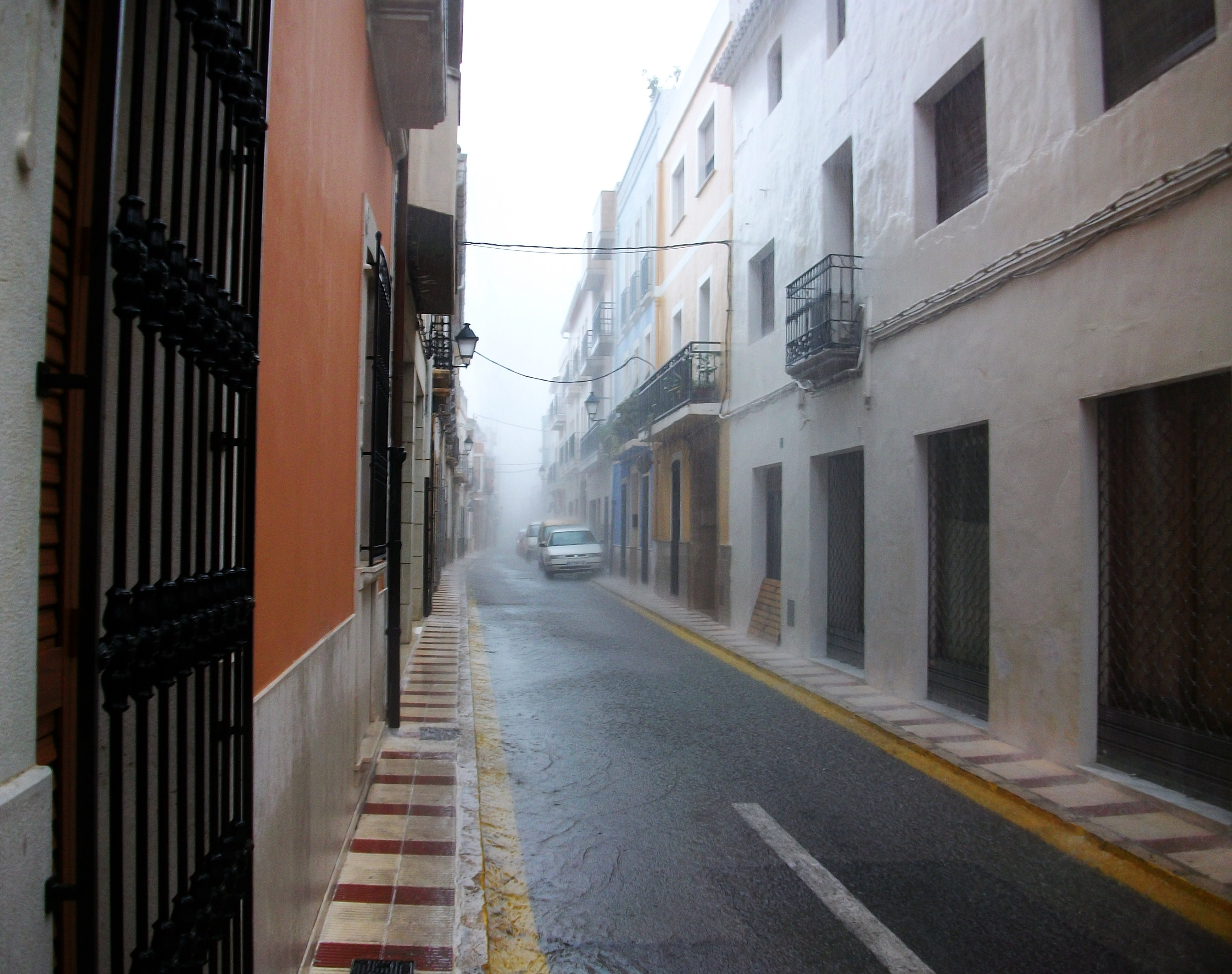 Pluja al carrer Signes, Gata de Gorgos.